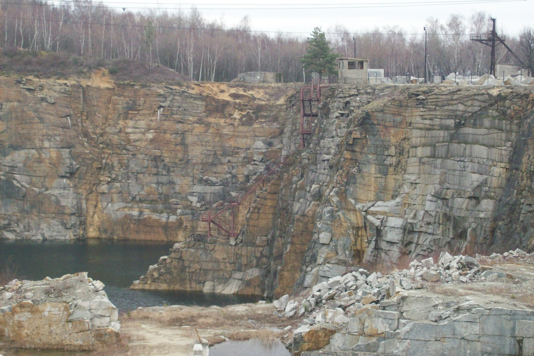 Kamieniołom Gross-Rosen